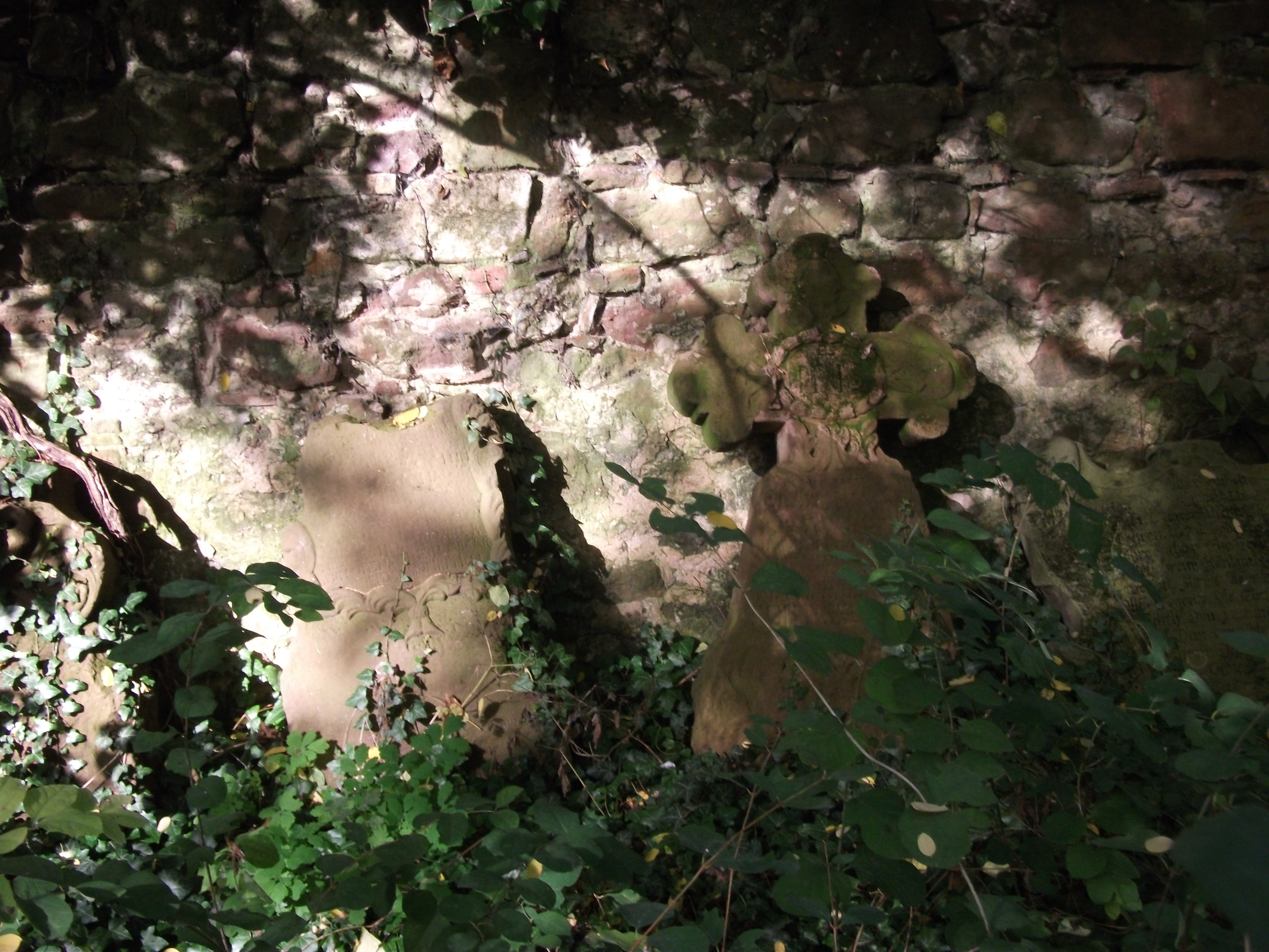 Dirmstein, Alter Friedhof, Teil der westlichen Mauer von innen